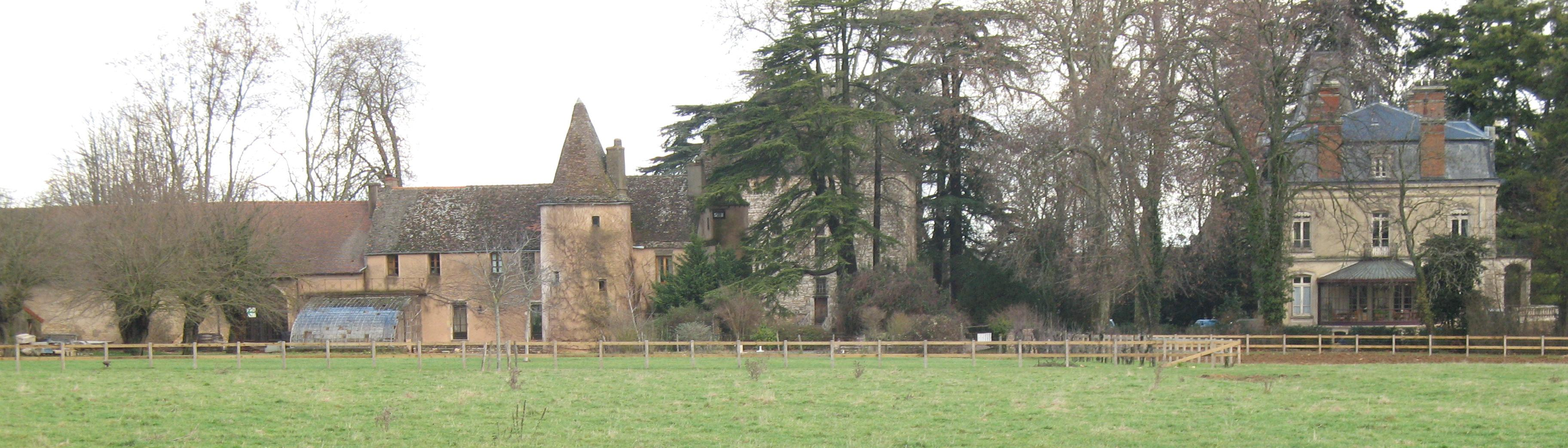 château de la Tour de Sennecey - Sennecey-le-Grand (Saône-et-Loire)